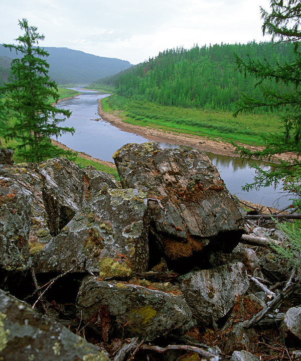 Река Крестях в Олекминском заповеднике